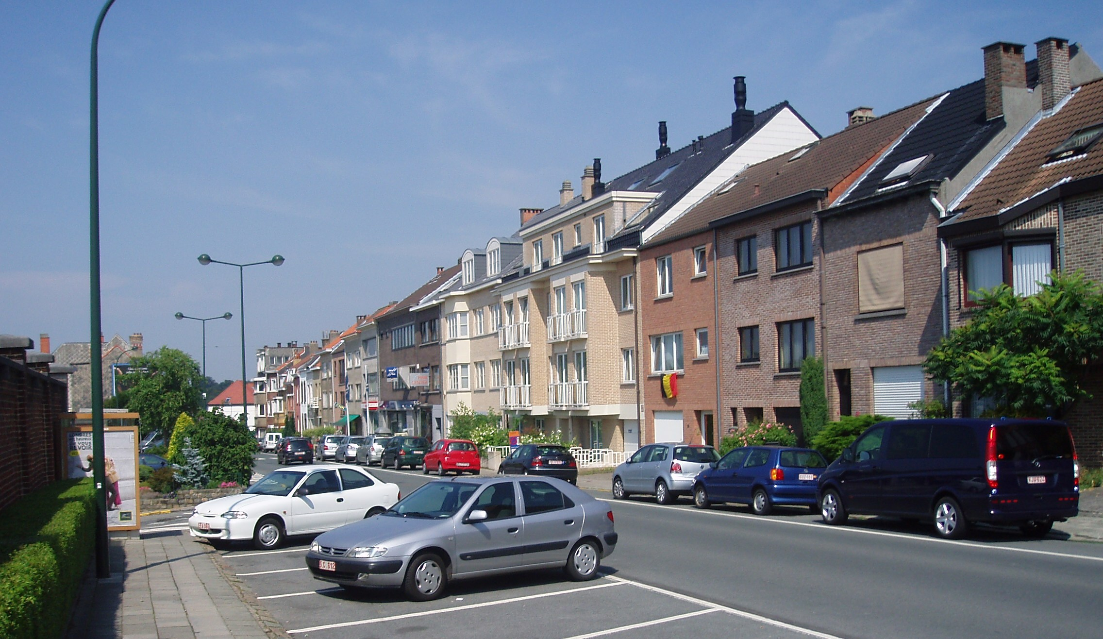 avenue Jean Van Hoorenbeeck Auderghem Belgium